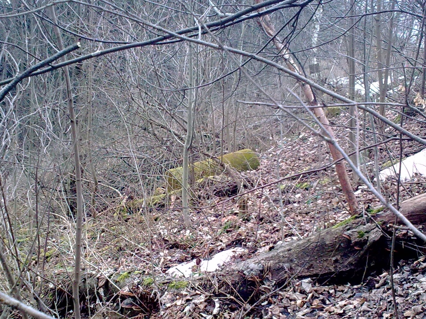 Kolumny z wieży na Górze Anny w Nowej Rudzie, leżące na stoku poniżej